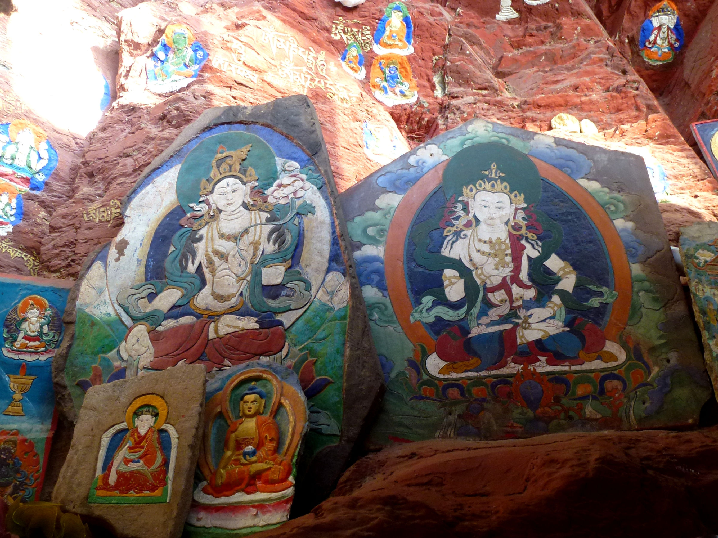 Yaowangshan Lhasa Tibet China 西藏 拉萨 药王山